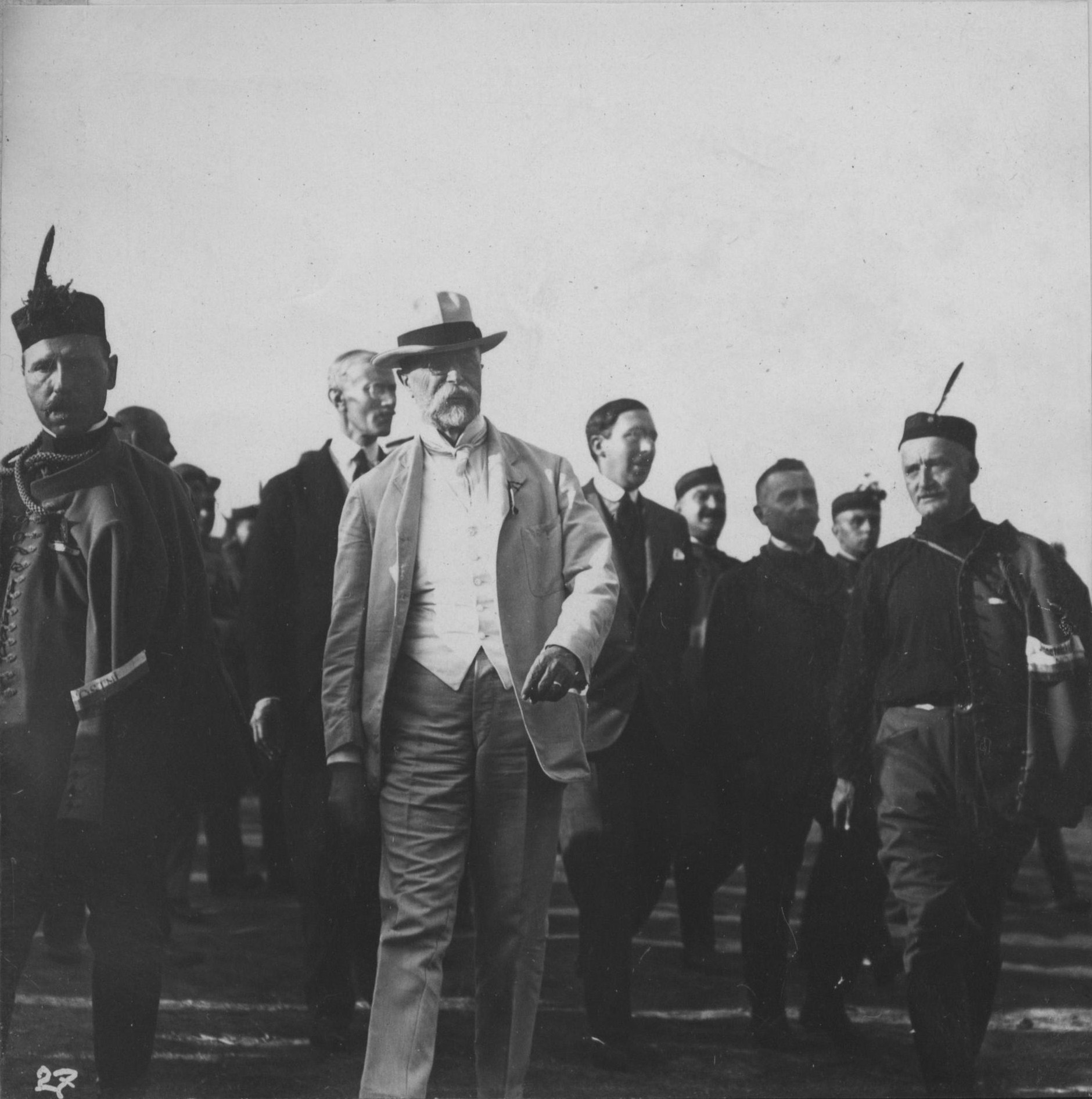 Tomas Masaryk au Sokol de 1920 à Prague.